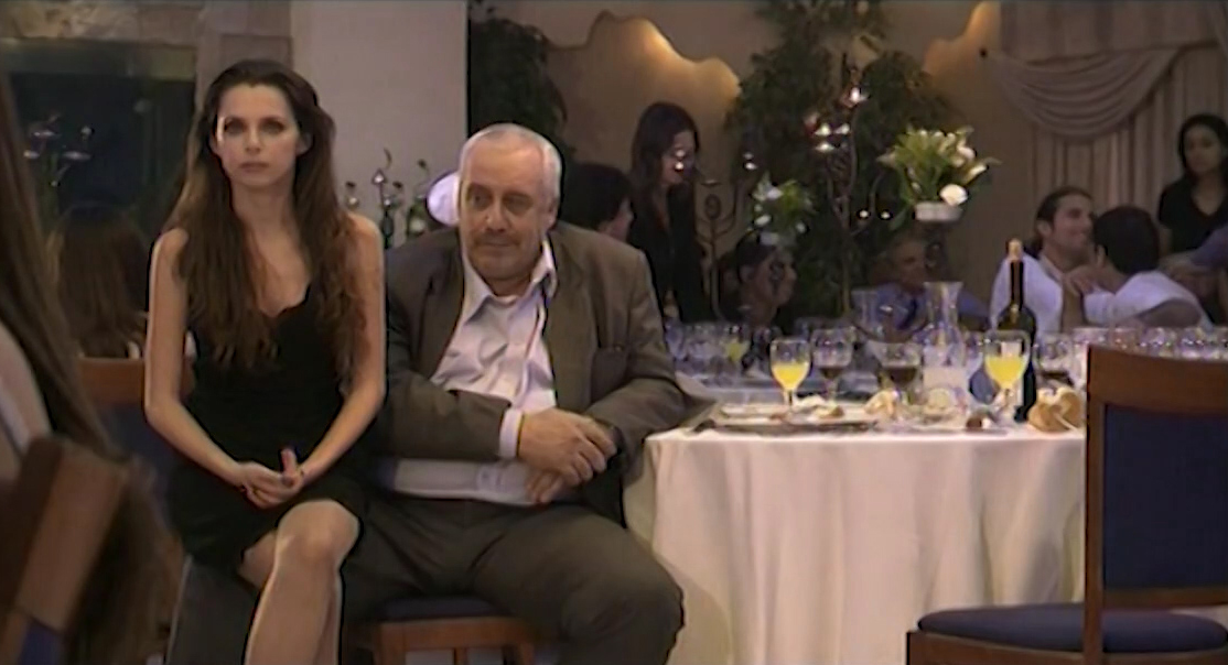 אנה סטפן ויוסי פולק בסרט "טניה 403"